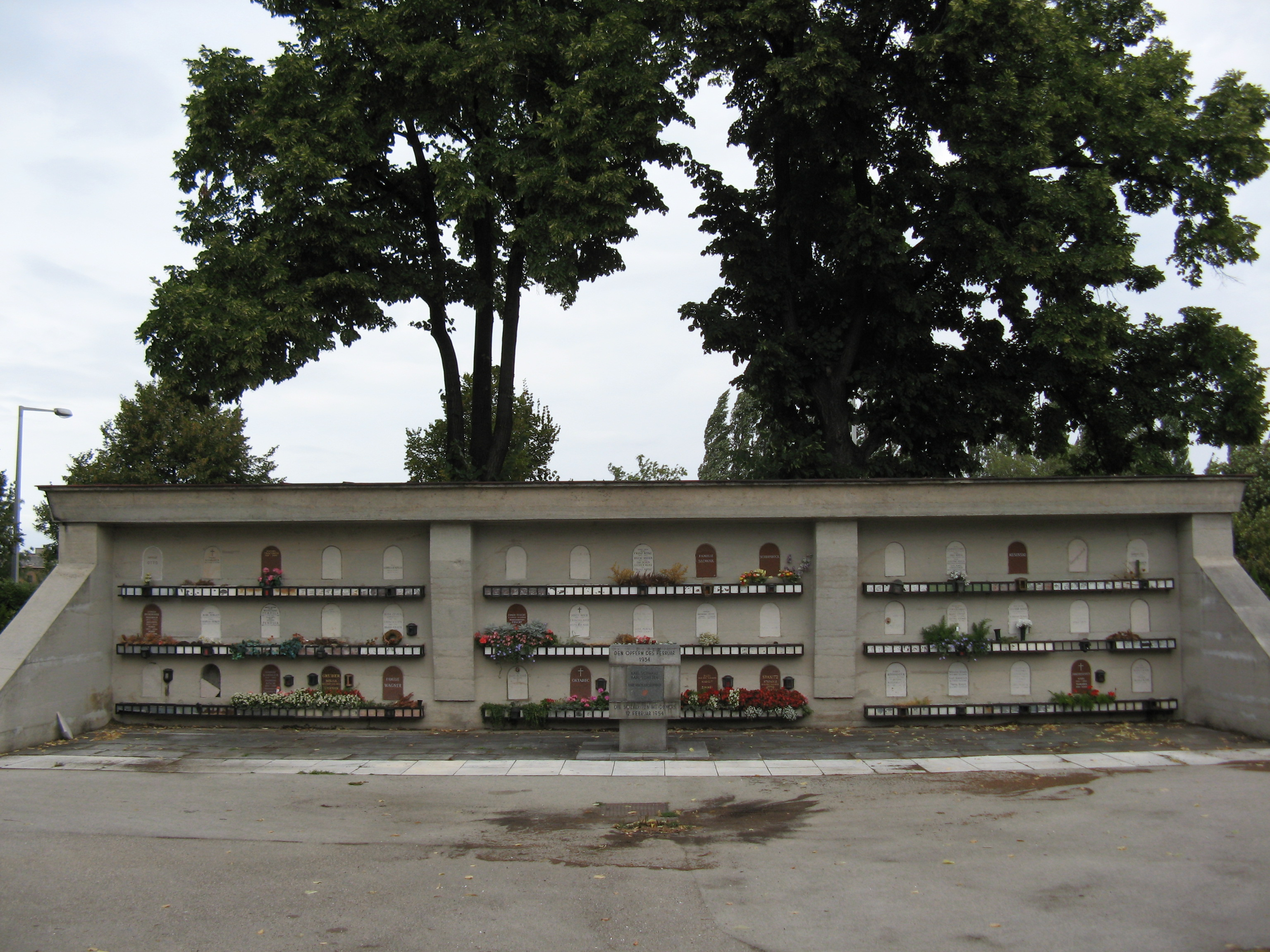 Urnennischengräberanlage auf dem Meidlinger Friedhof in Wien.